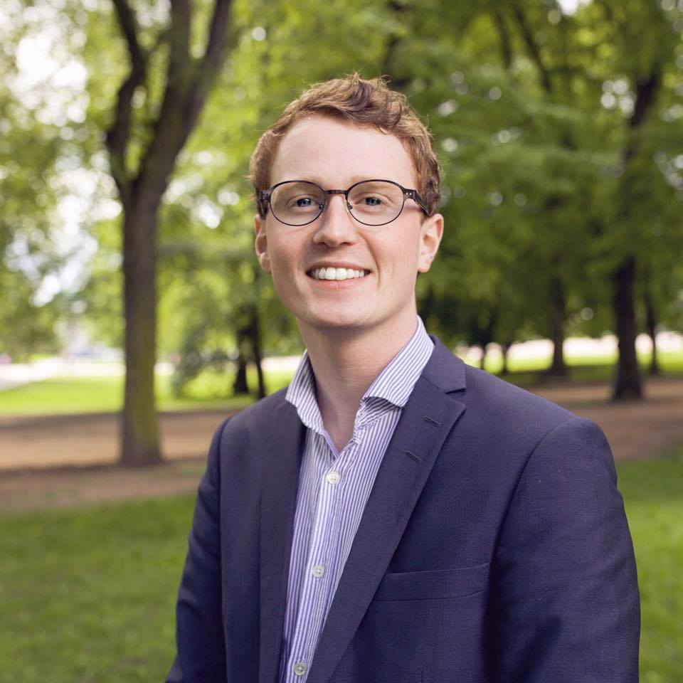 Petter William Haraldsen Haugland, foto: Markus Mjaaland